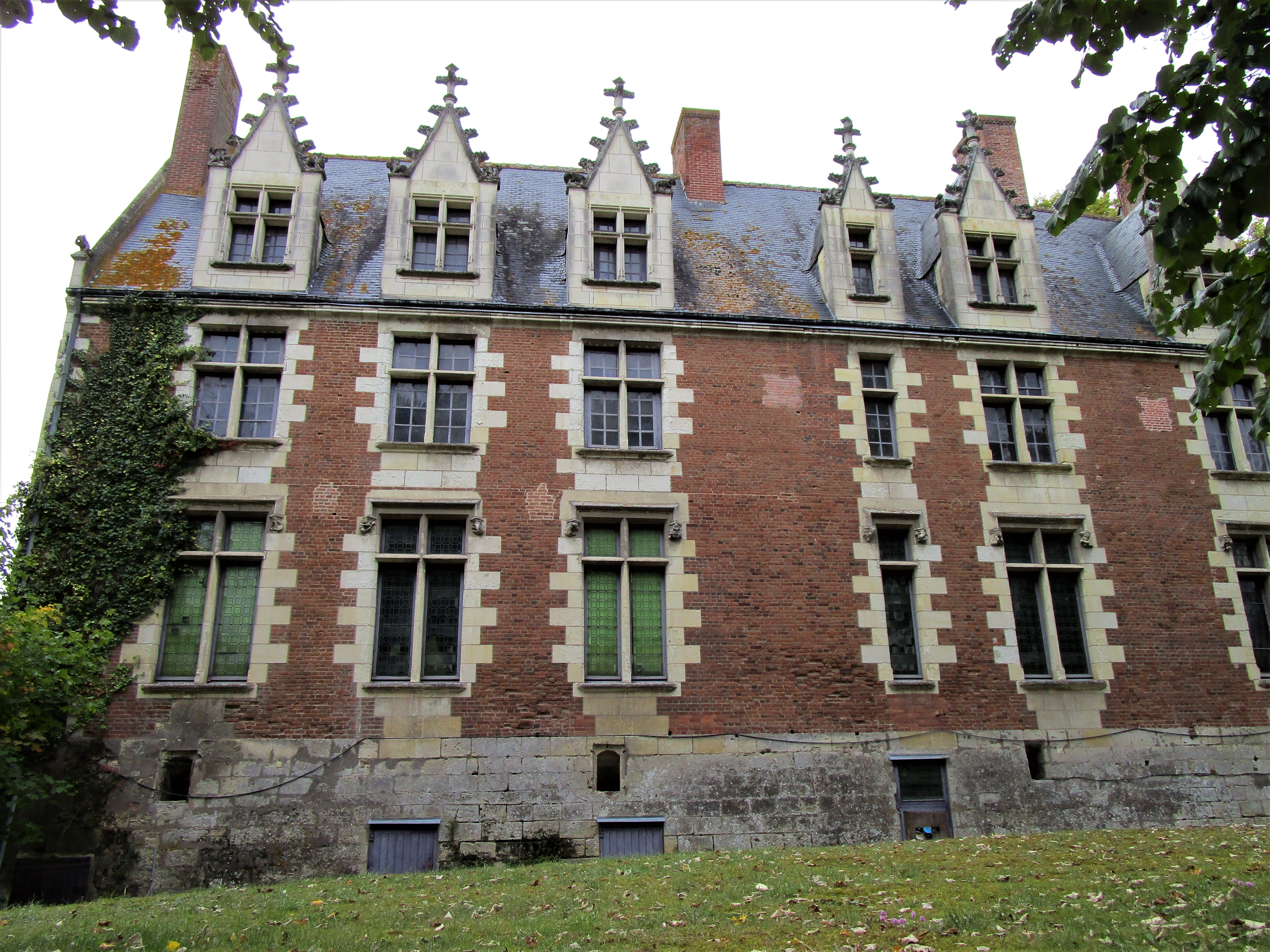 Le château de Plessis-lès-Tours en octobre 2017.